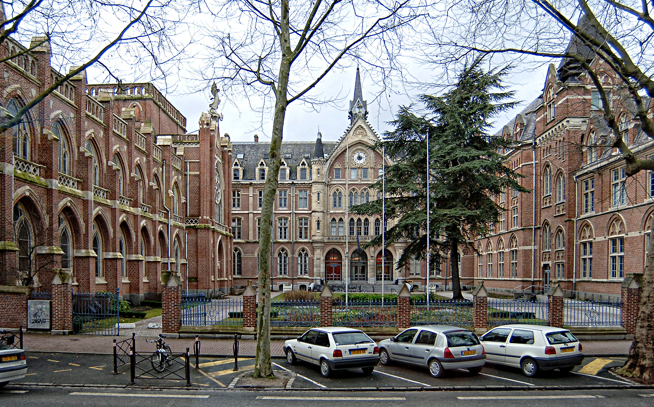 Лиль 2006